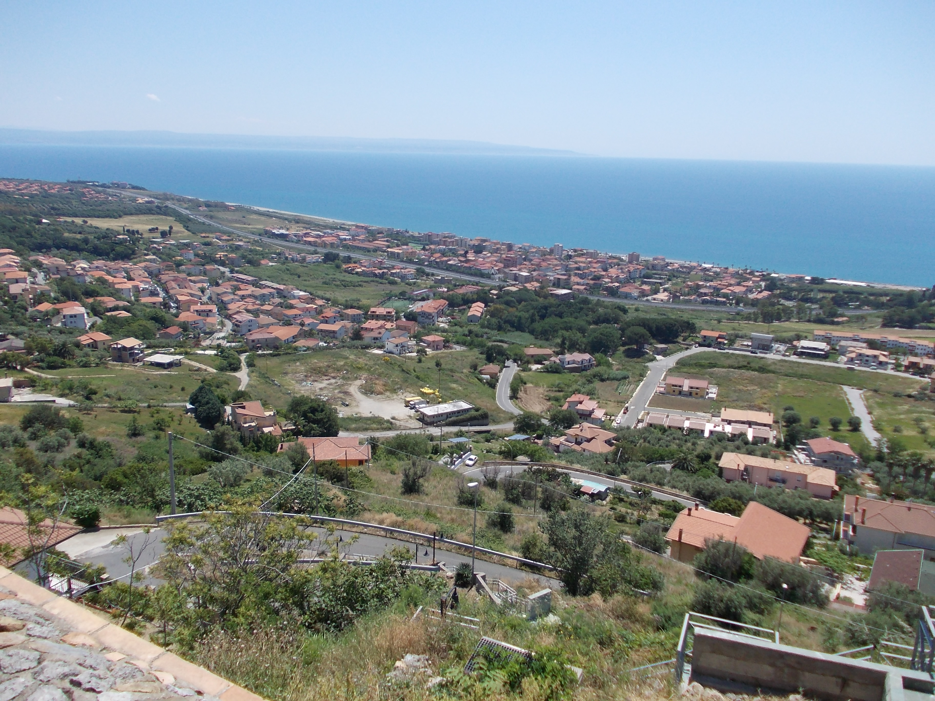 Panorama di Falerna visto da Castiglione Marittimo (fraz. di Falerna)